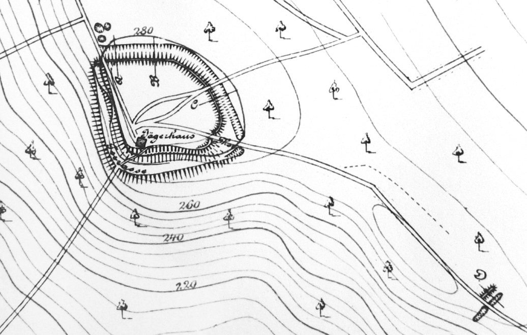 Plan der Obensburg